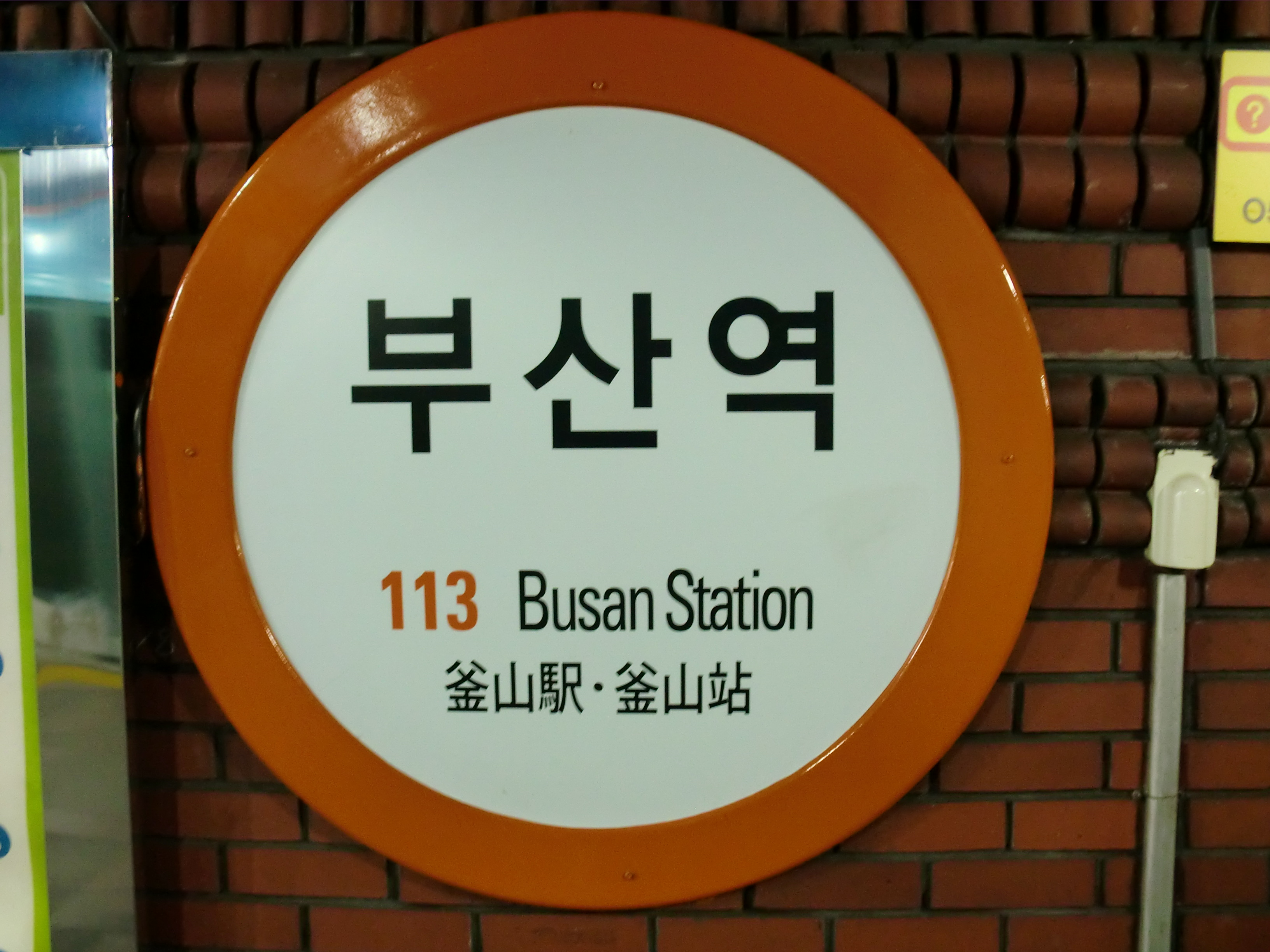 부산도시철도 1호선 부산역의 역명판